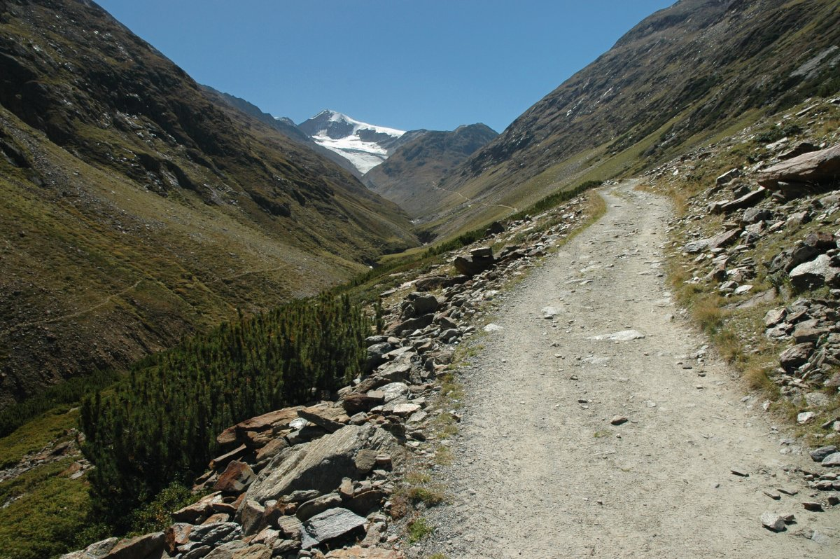 V dáli vrcholek Similaunu